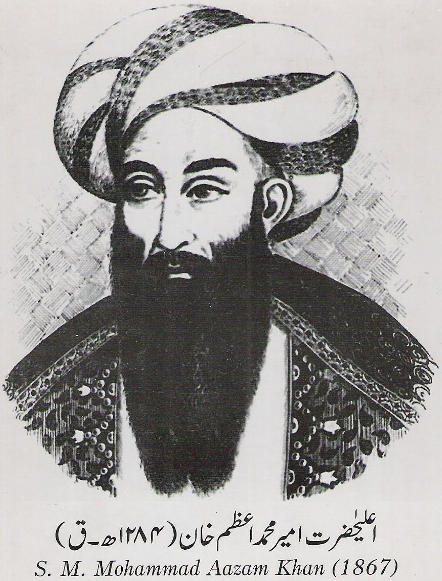 Amir Muhammad Azam Khan an Afghan Diplomat